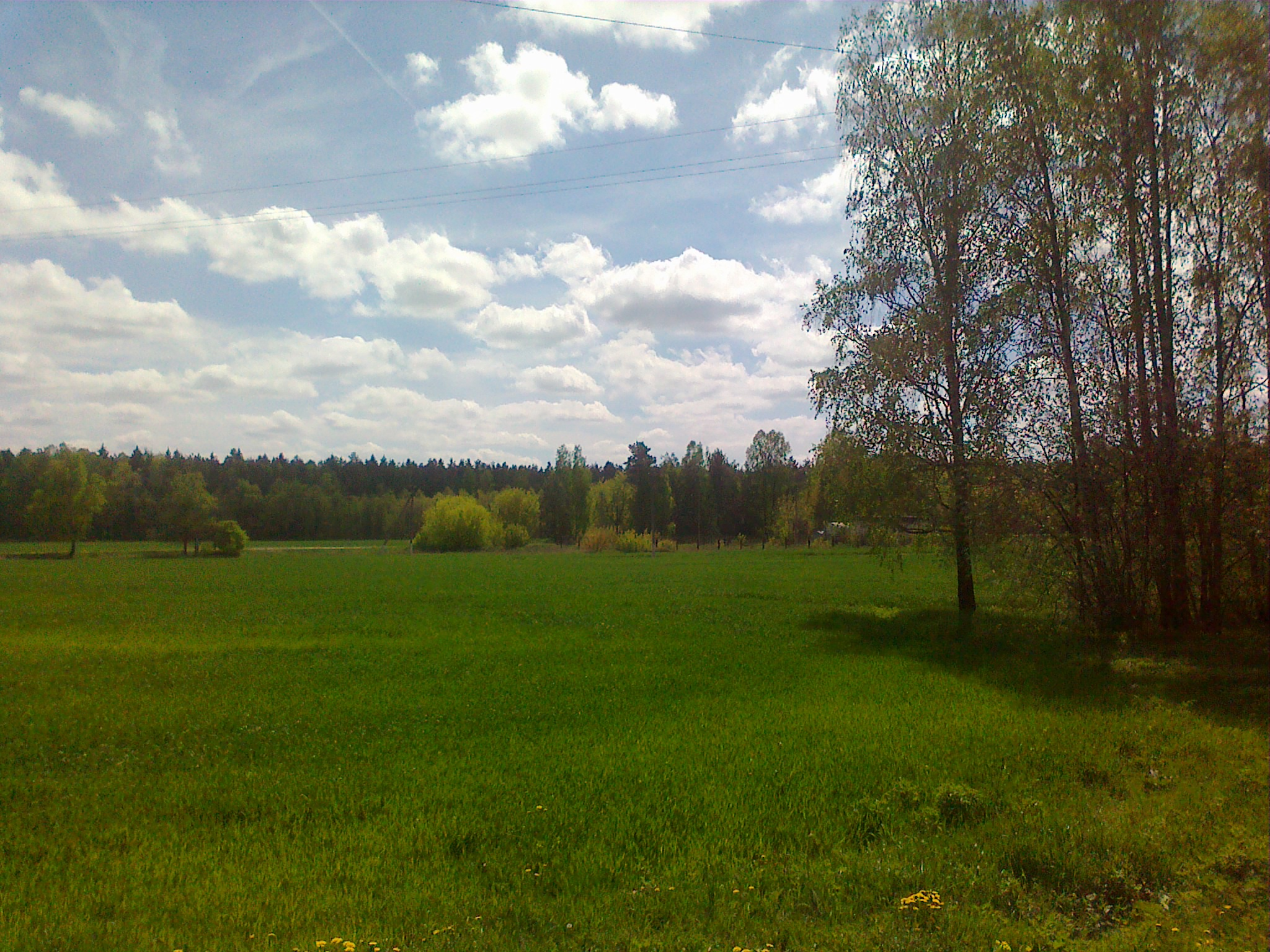 поле у деревни Вишневка, Бобруйский район